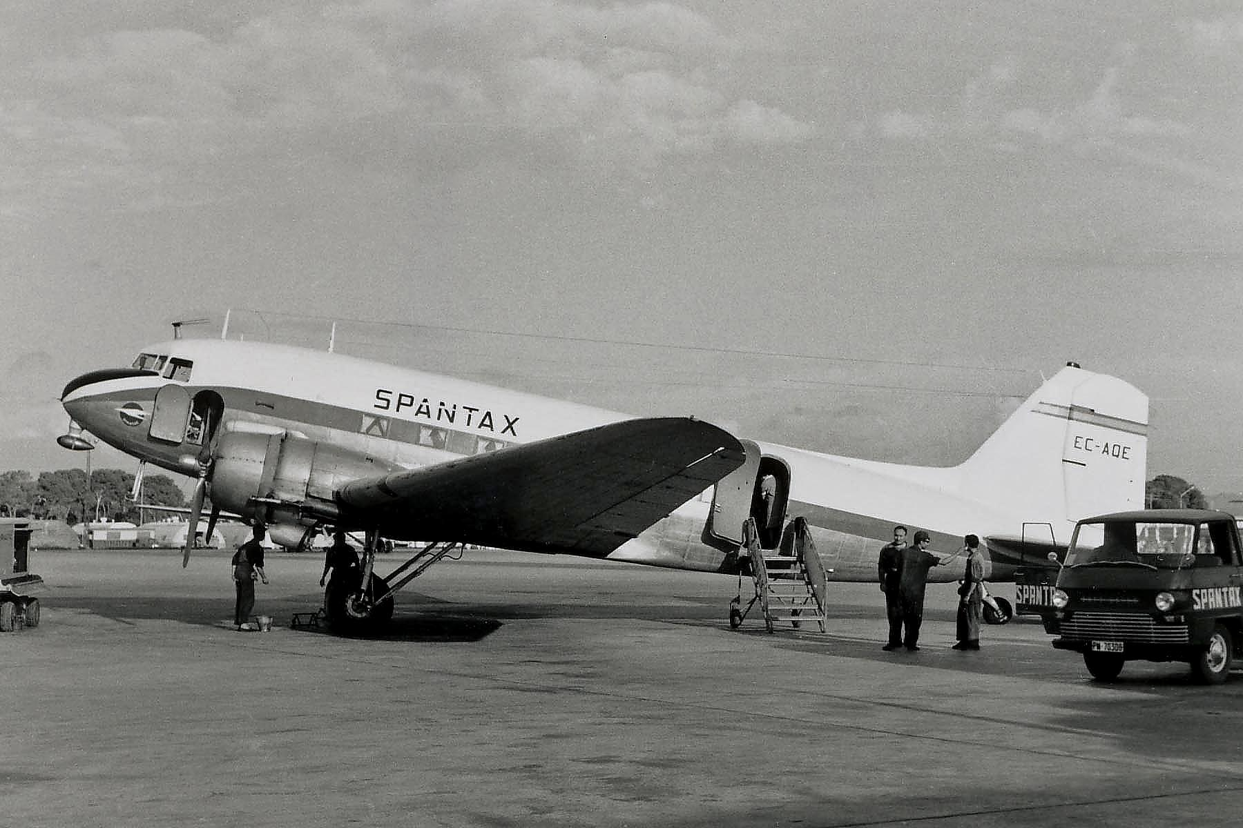 Douglas DC-3 na letišti v Palma de Mallorca